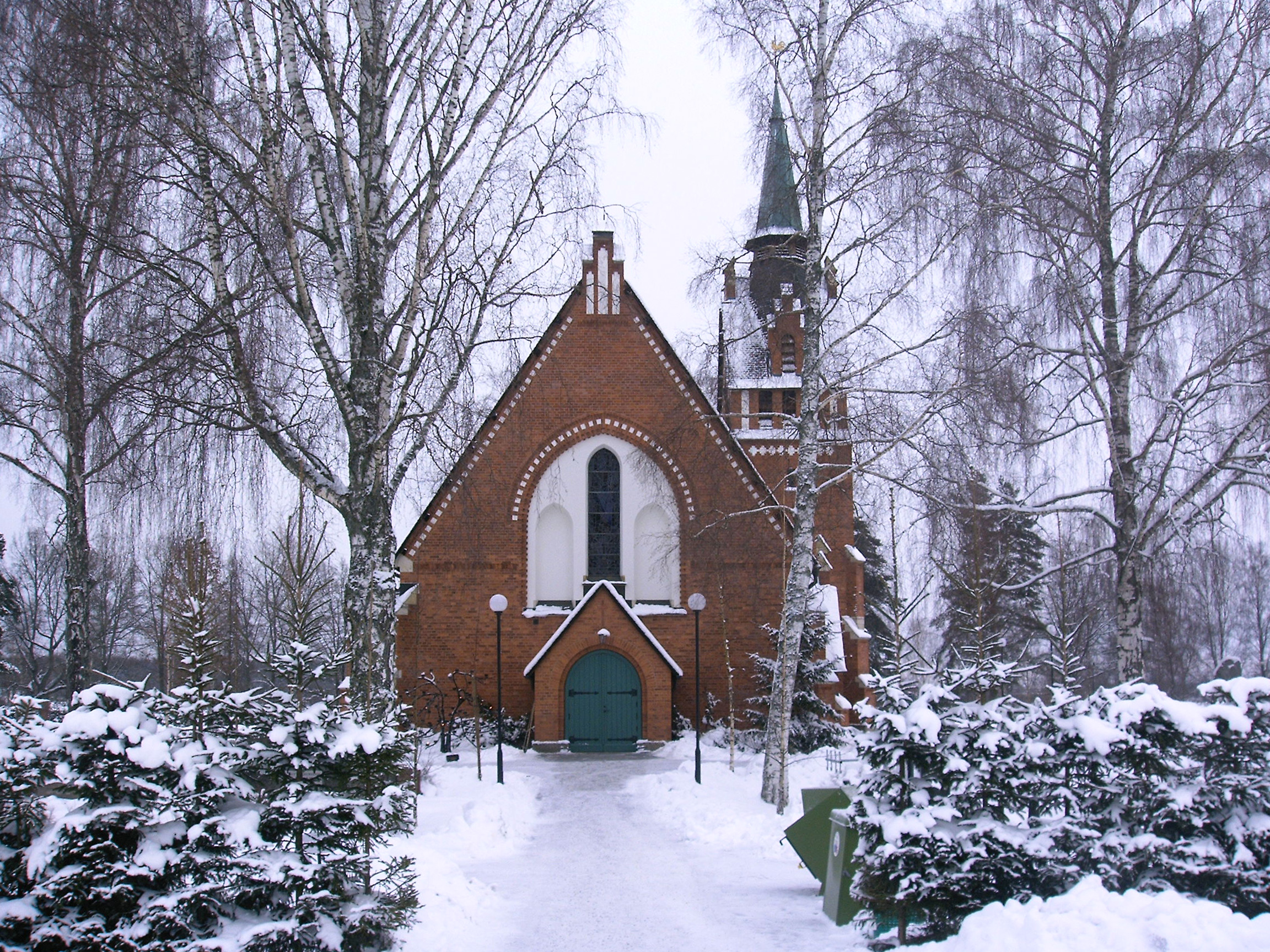 Längbro kyrka från väster